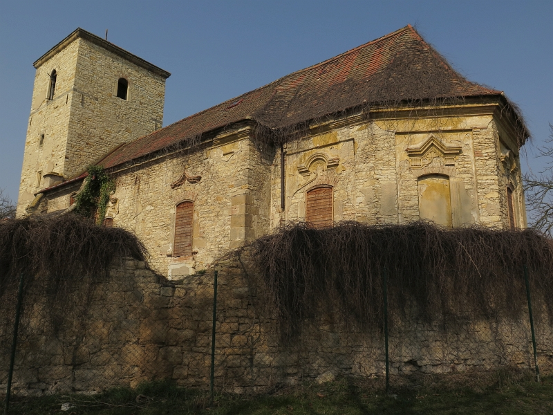 Kostel svatého Jiří, Malešov (Hoštka).